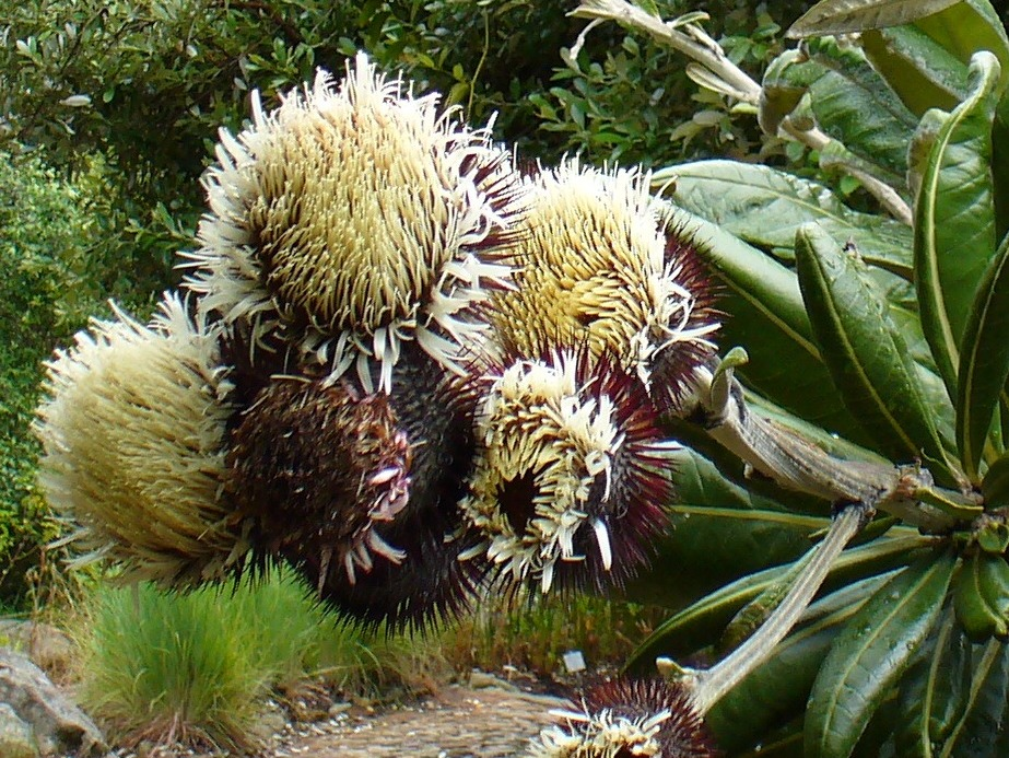 Oldenbergia grandis